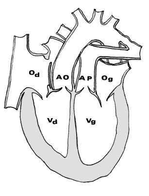 Schéma en noir et blanc de l'anatomie de la transposition des gros vaisseaux